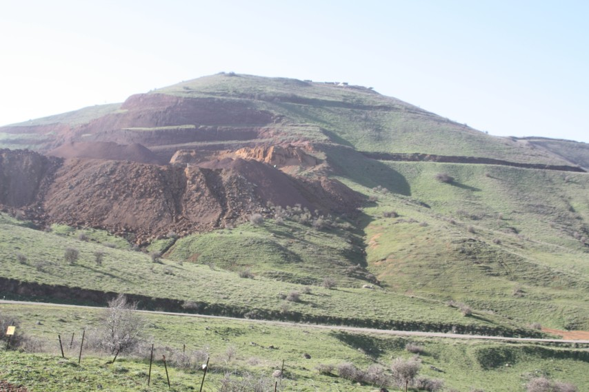 הר חרמונית.